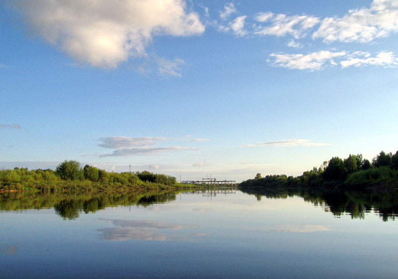 Vetluga river in Russia